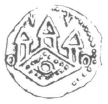 Tübinger Pfennig (12.-13. Jh.)